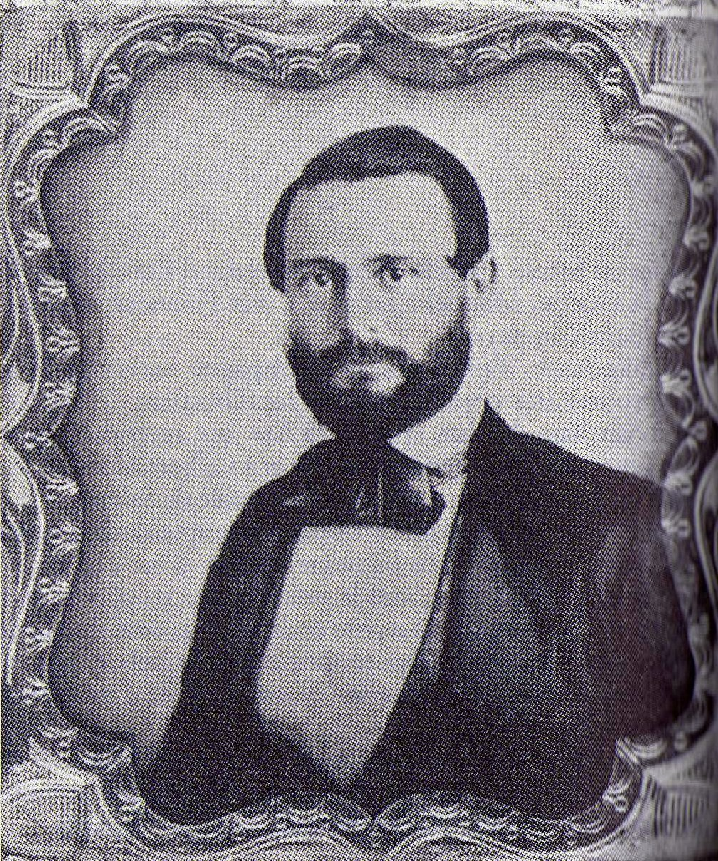 Photo de Callender Irvin Fayssoux (1820-1897), prise vers 1856